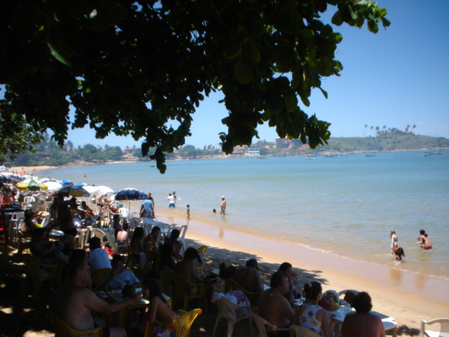 Ubu, Guarapari, Espírito Santo, Brasil